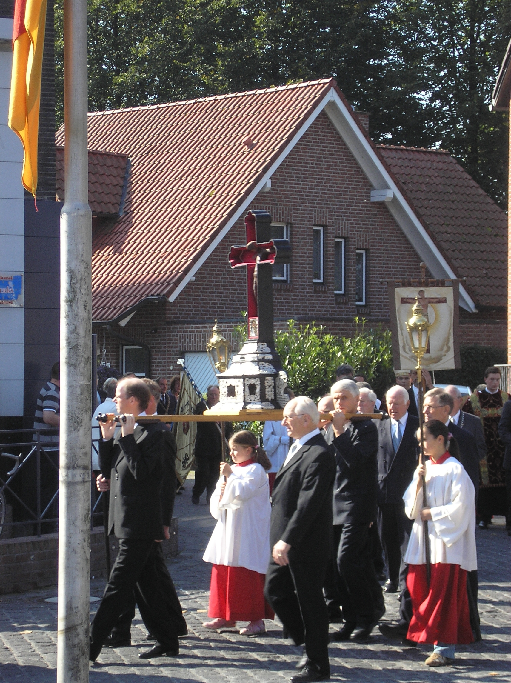 Kranenburger Kreuztracht 2007 - das wundertätieg Kreuz im Bildmittelpunkt